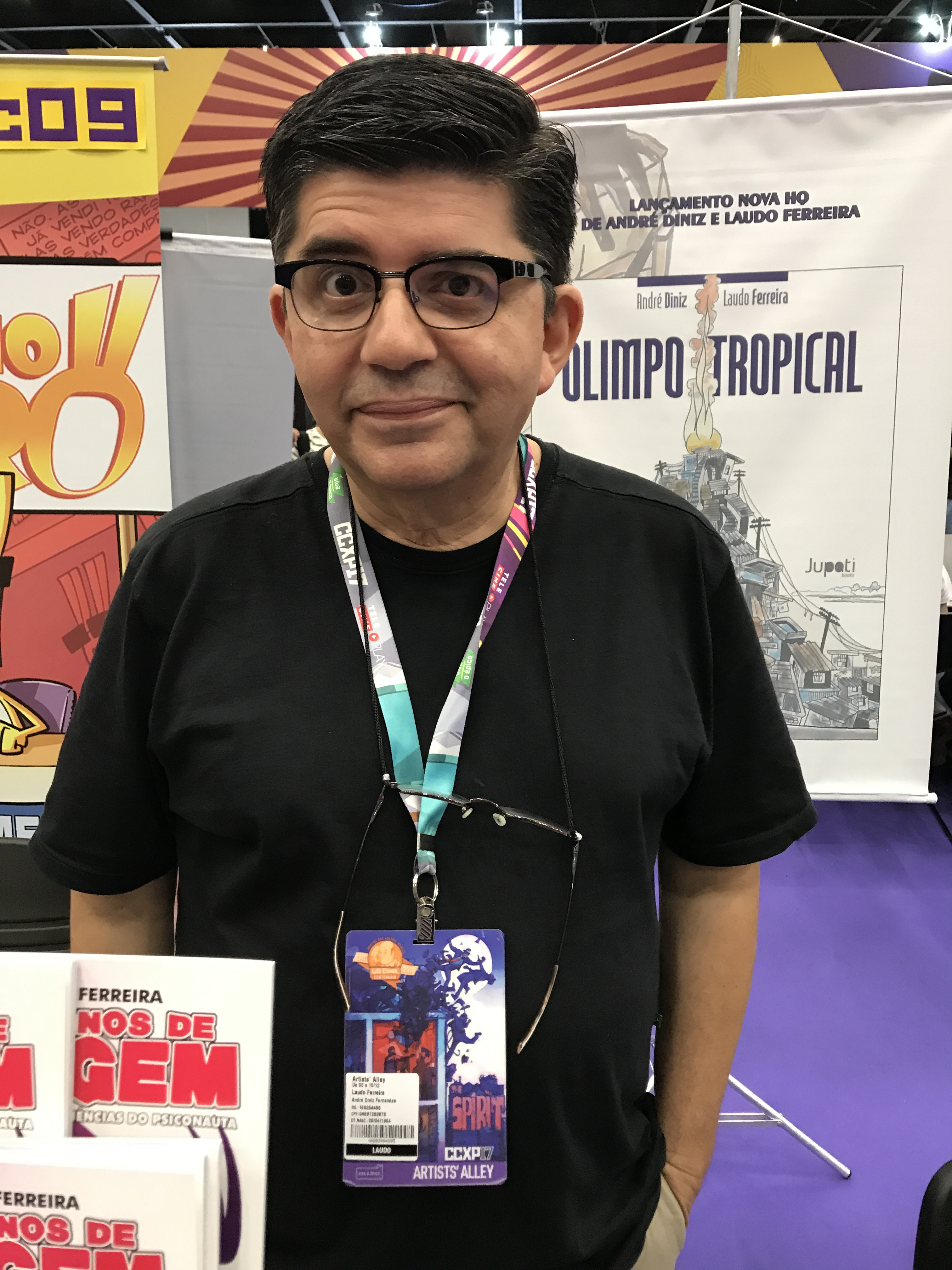 Artista Laudo Ferreira na edição de 2017 da Comic Con Experience